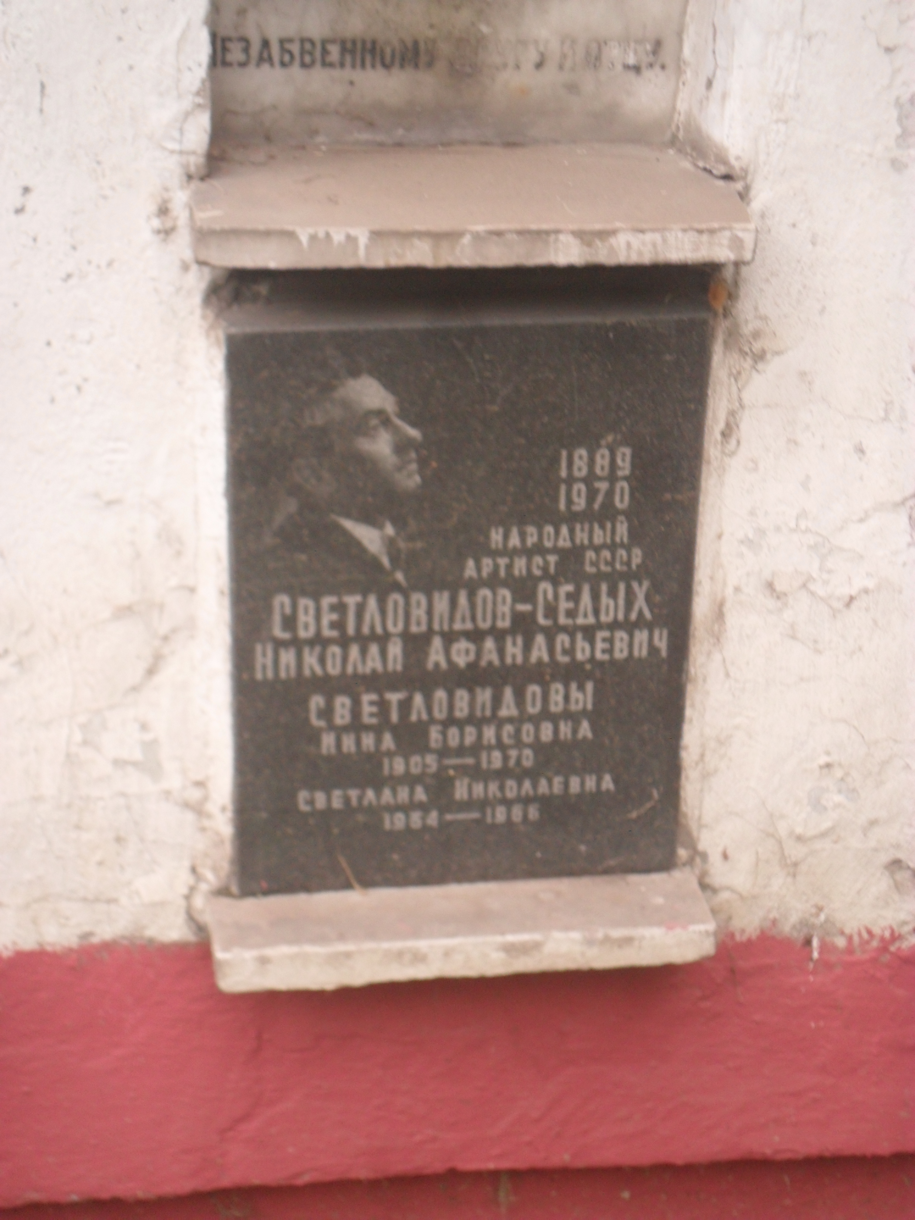 Плита колумбария артиста Николая Светловидова на Новодевичьем кладбище Москвы.